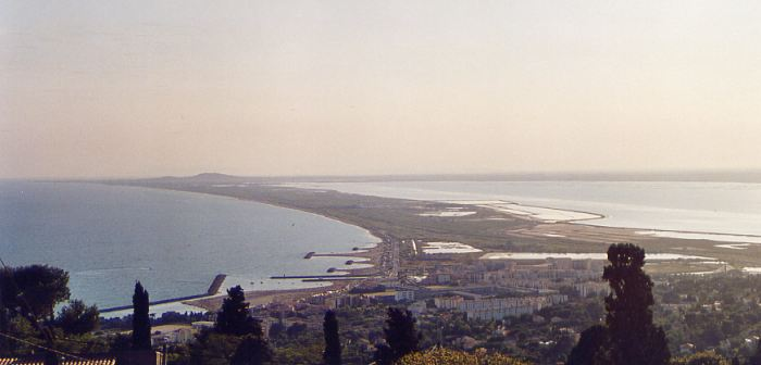 Description: Littoral héraultais, entre mer et étangs. France, Hérault. Ici: Le Lido, entre Sète et Agde (dont on aperçoit le Mont St Loup au fond). Bande de terre séparant la Mer Méditerranée du Bassin de Thau (à droite).